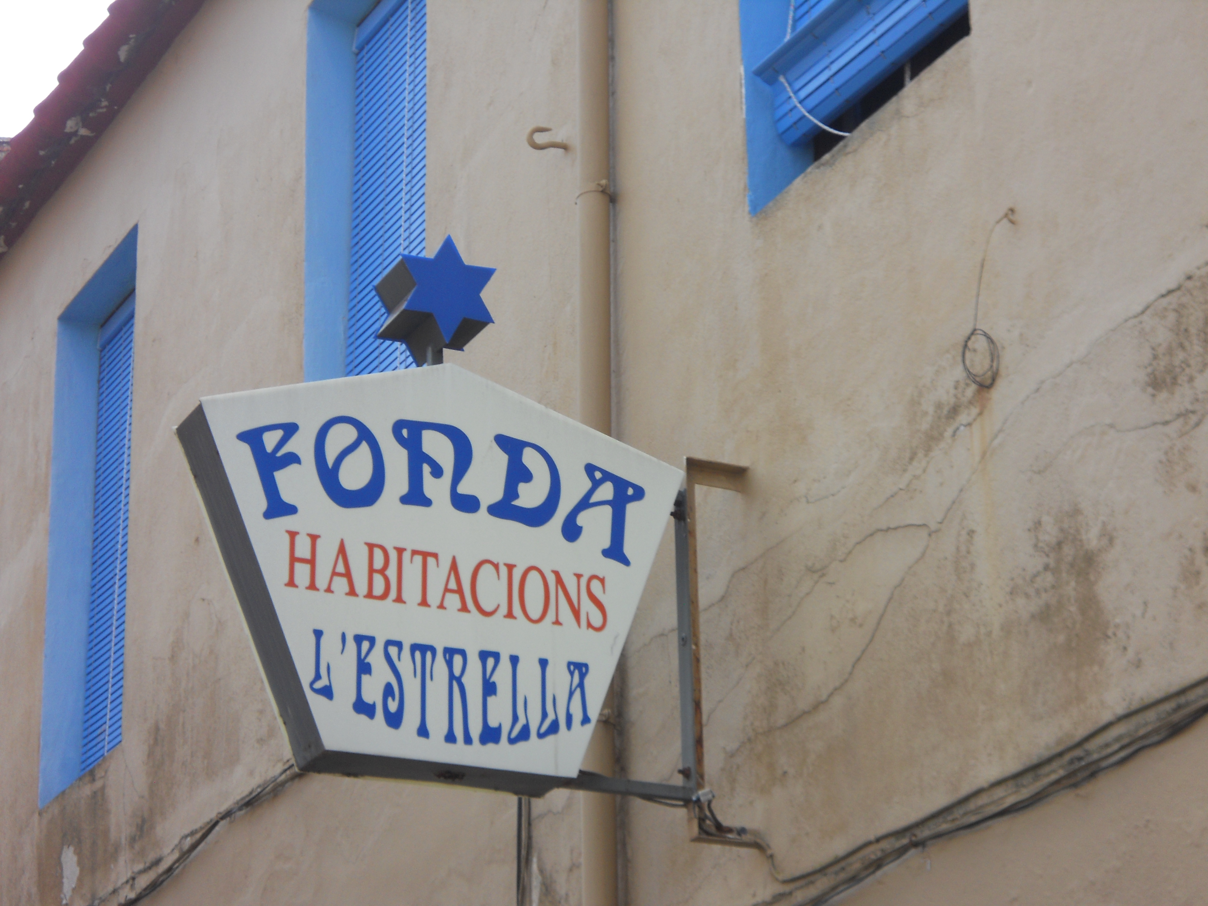 Fonda l'Estrella de Palafrugell, Baix Empordà.